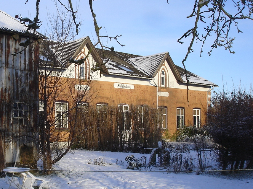 Alslev Kro (ty: Alslebenkrug) Amtsbanestation fra sporsiden